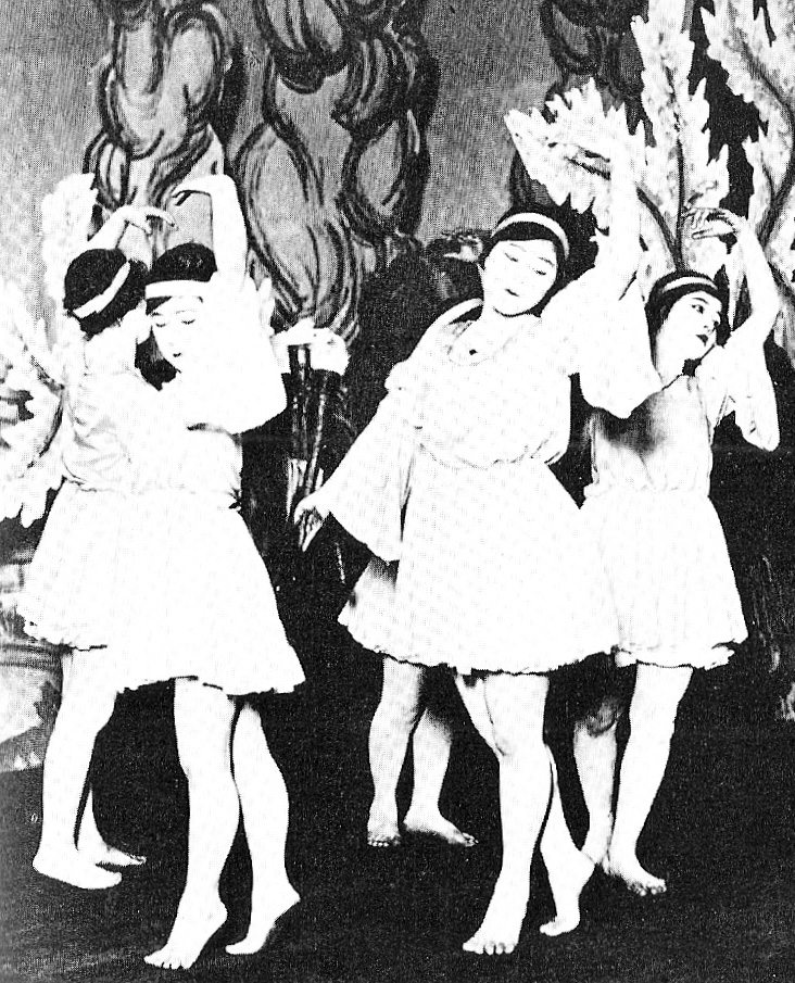 大阪松竹座にて、松竹楽劇部（後のOSK）による、『アルルの女』(The Girl from Arles/L'Arlésienne)。